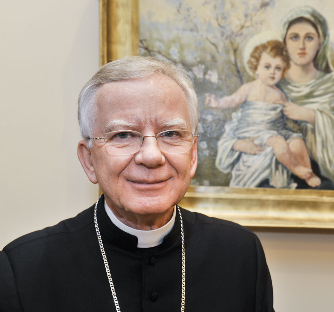 Abp Marek Jędraszewski w łódzkiej kurii